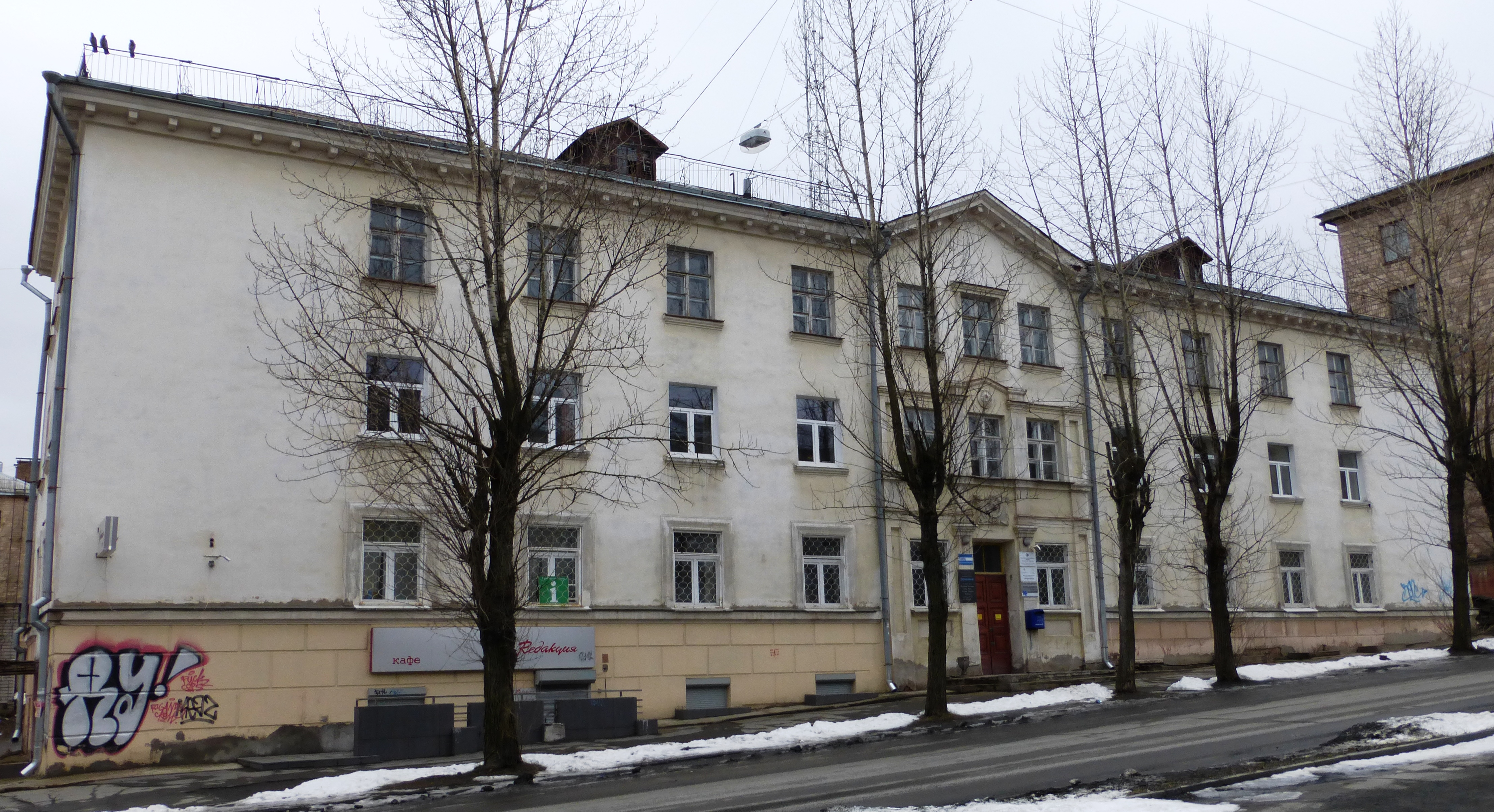 Здание на ул.Титова.